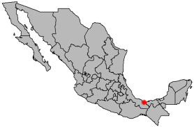 Locator map of Coatzacoalcos, Veracruz, Mexico